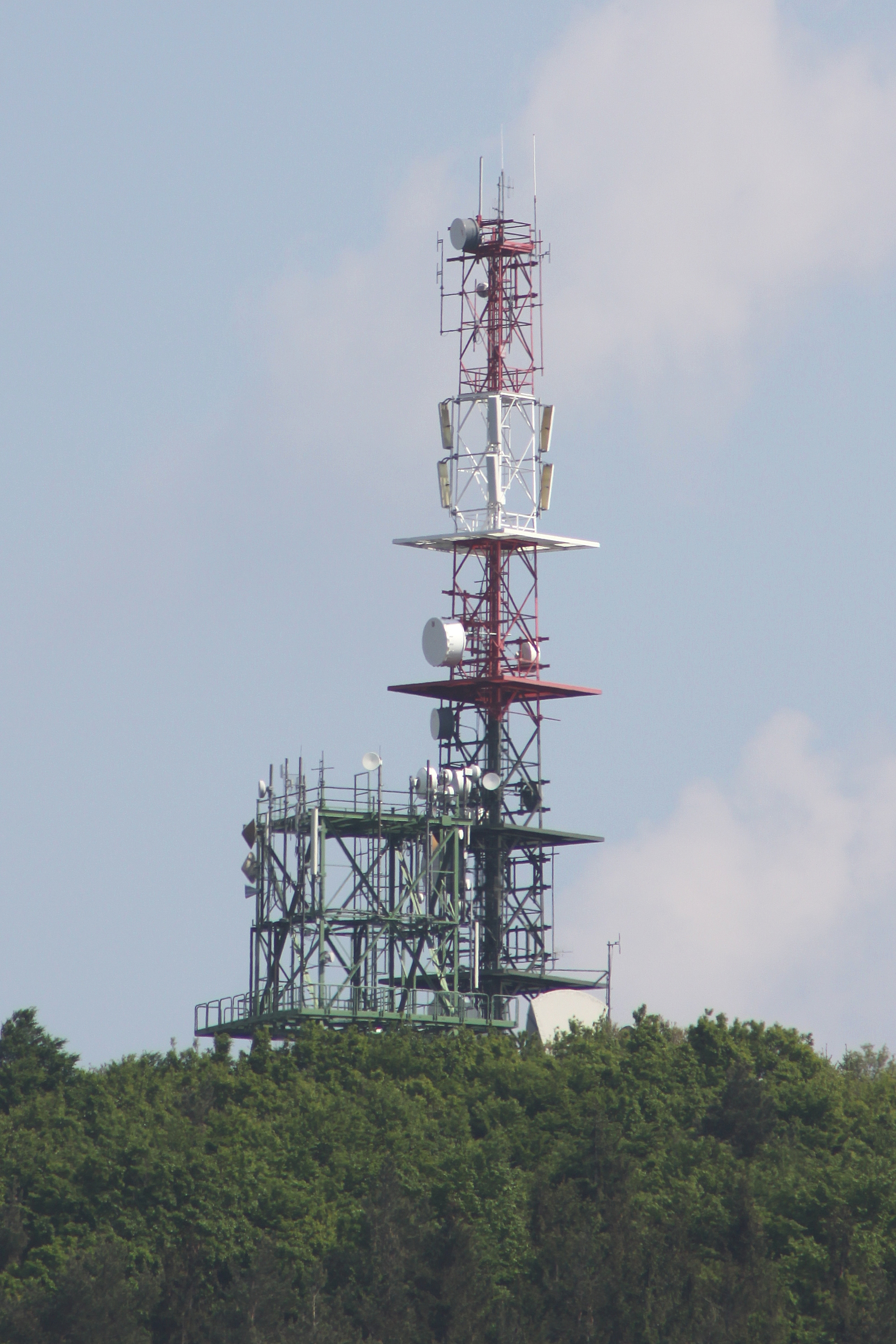 Sieggraben - Mobilfunk- und Richtfunksender Brentenriegel (606 m.ü.A.)